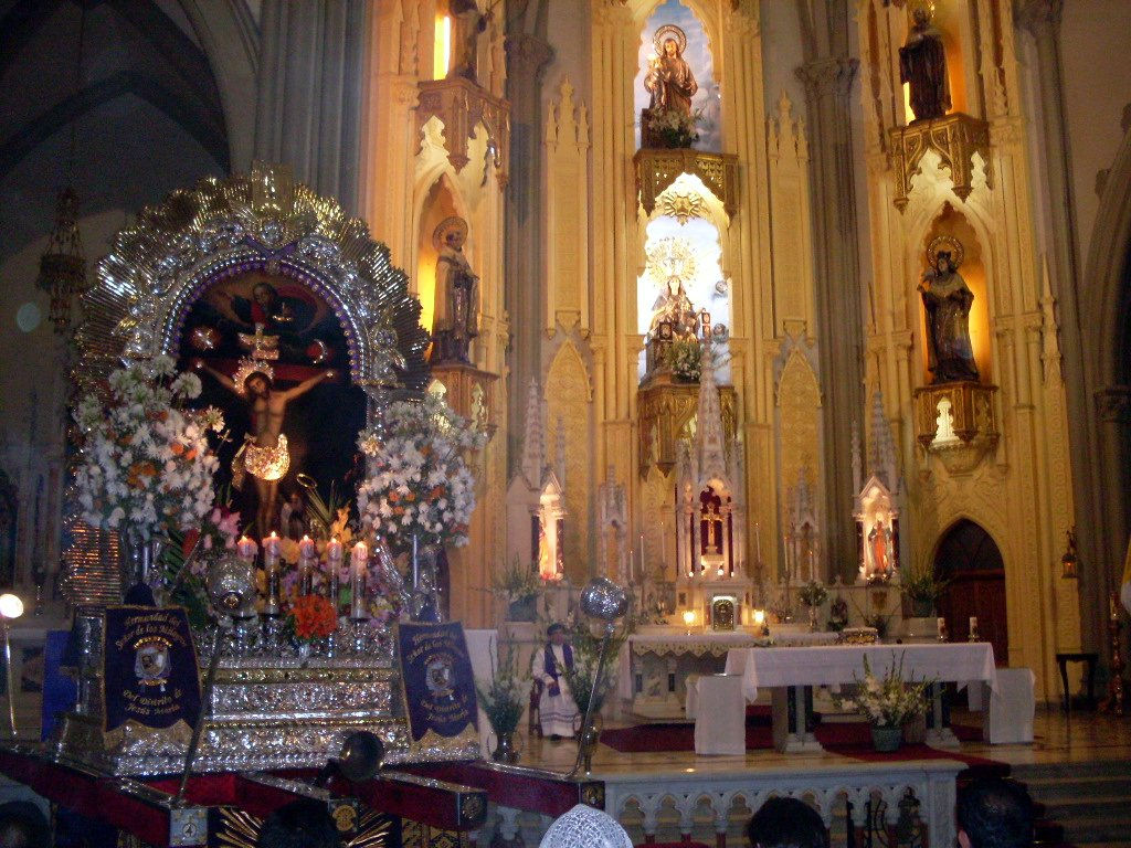 El Señor de los Milagros de Jesús Maria al lado del Altar Mayor de la Iglesia de San José.